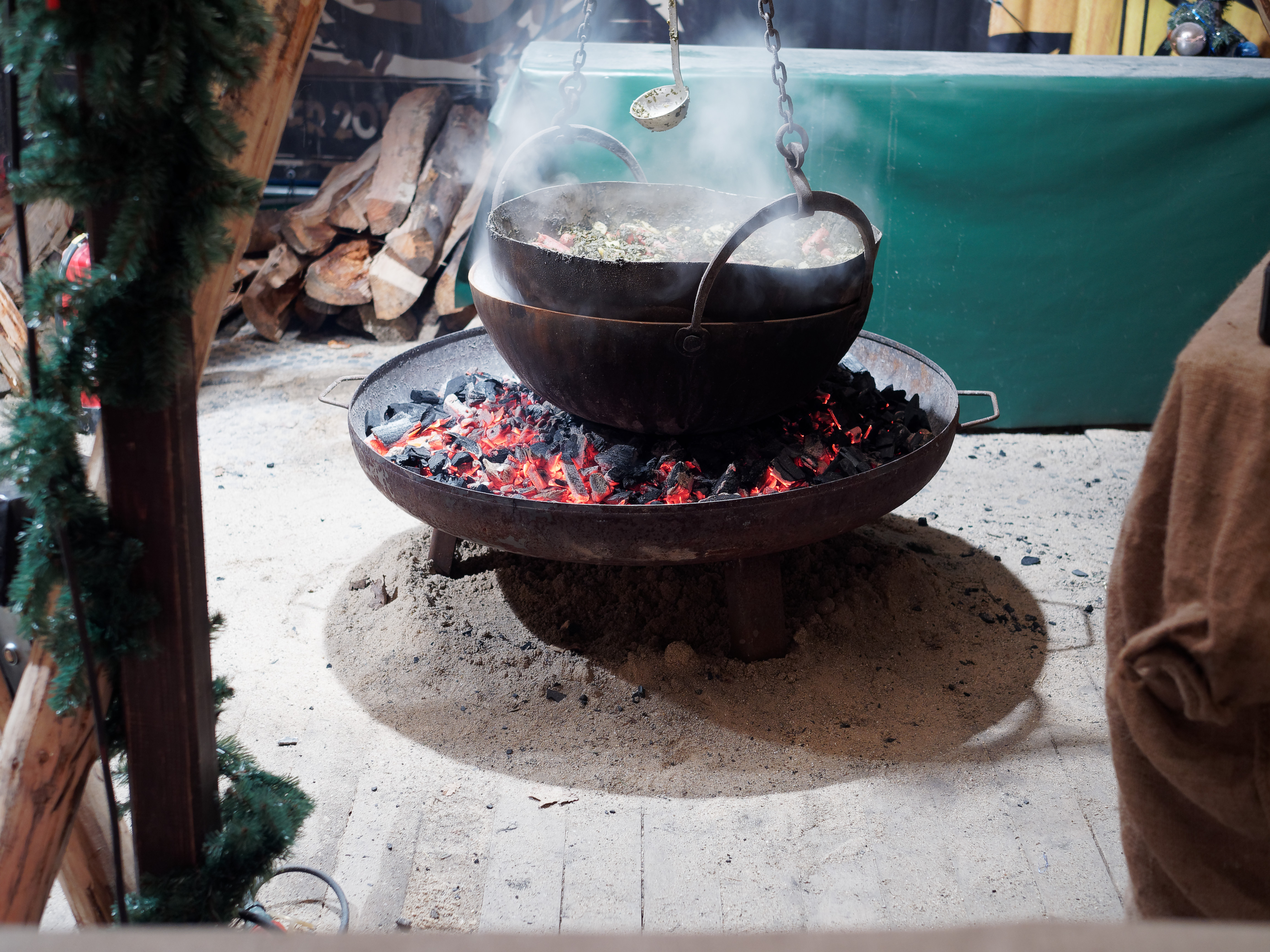 Dortmund-Fredenbaum, Mittelalter-Markt im Fredenbaumpark, Grünkohl und Mettwürstchen im Kessel im Wasserbad gekocht